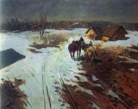 М. Греков. Ночная разведка.